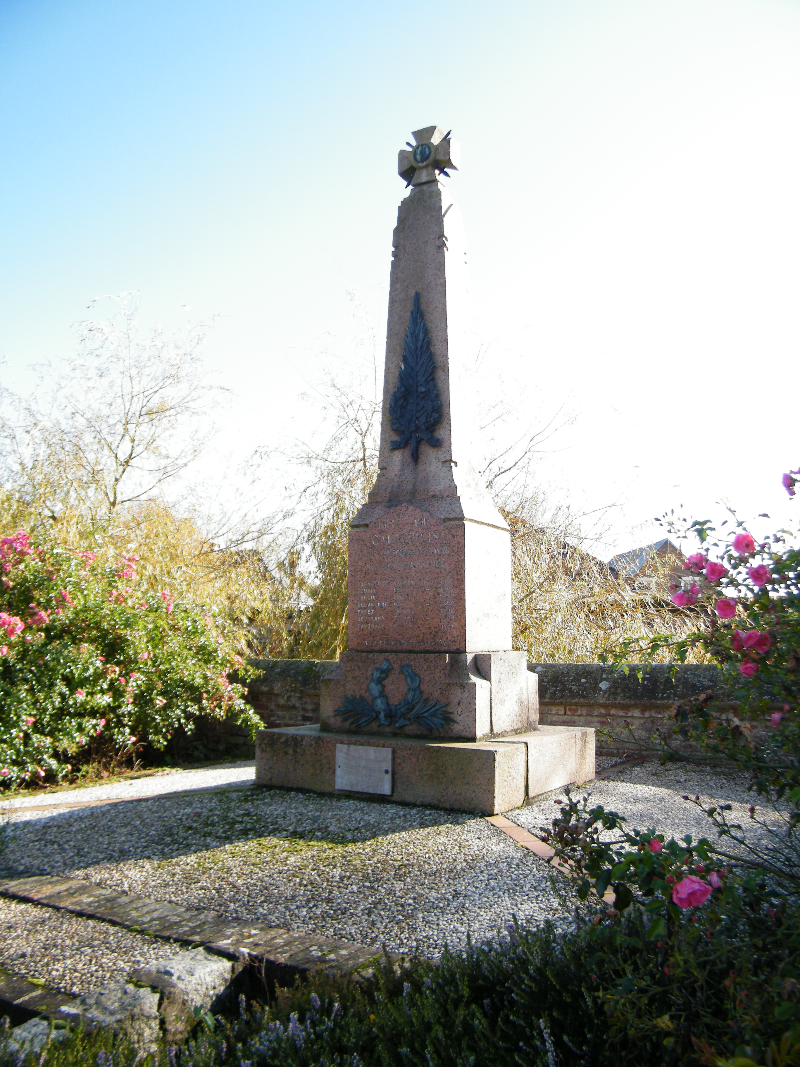 Monument.